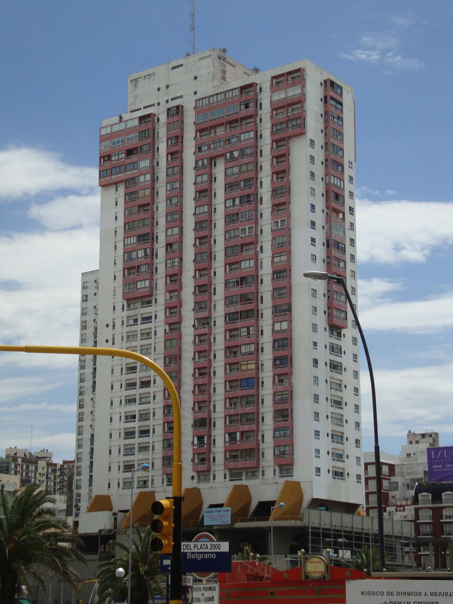 Torre principal del inconcluso Complejo Bristol Center. A la izquierda, abajo, se observa la estructura abandonada que hubiera sostenido a la torre sur. Detrás de la torre central se observa parte de la torre norte. Mar del Plata, Argentina.